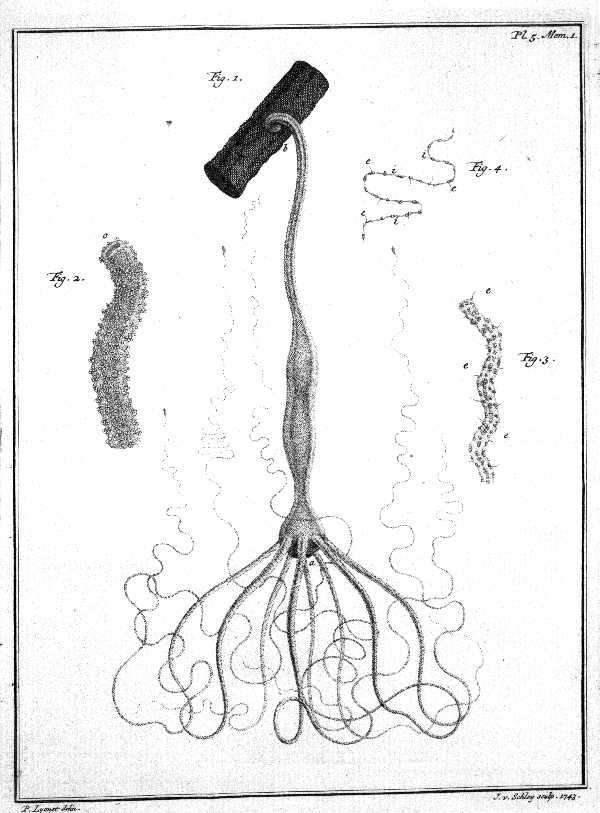 A hydra from Abraham Trembley. Mémoires, pour servir à l'histoire d'un genre de polypes d'eau douce, à bras en forme de cornes. Leiden: Chez Jean and Herman Verbeek, 1744